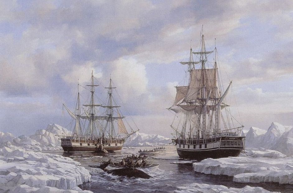 Olieverf schilderij Peter J Sterkenburg